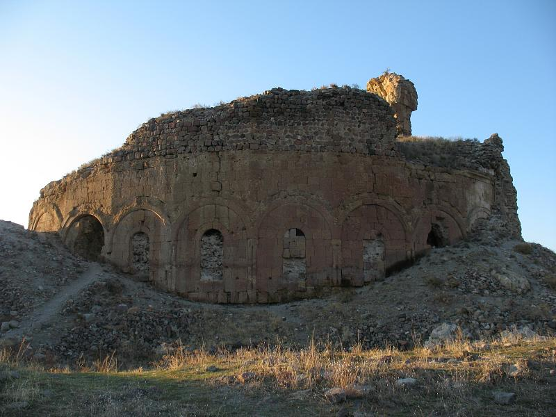 Restanten van een Armeens-Georgische kerk, in Penek (Georgisch: Bana)